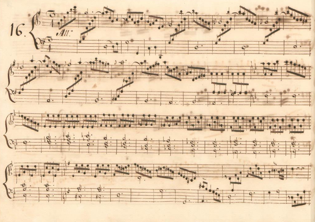 La sonate K. 260, telle qu'elle se présente dans le manuscrit de Parme, volume VI no. 16.